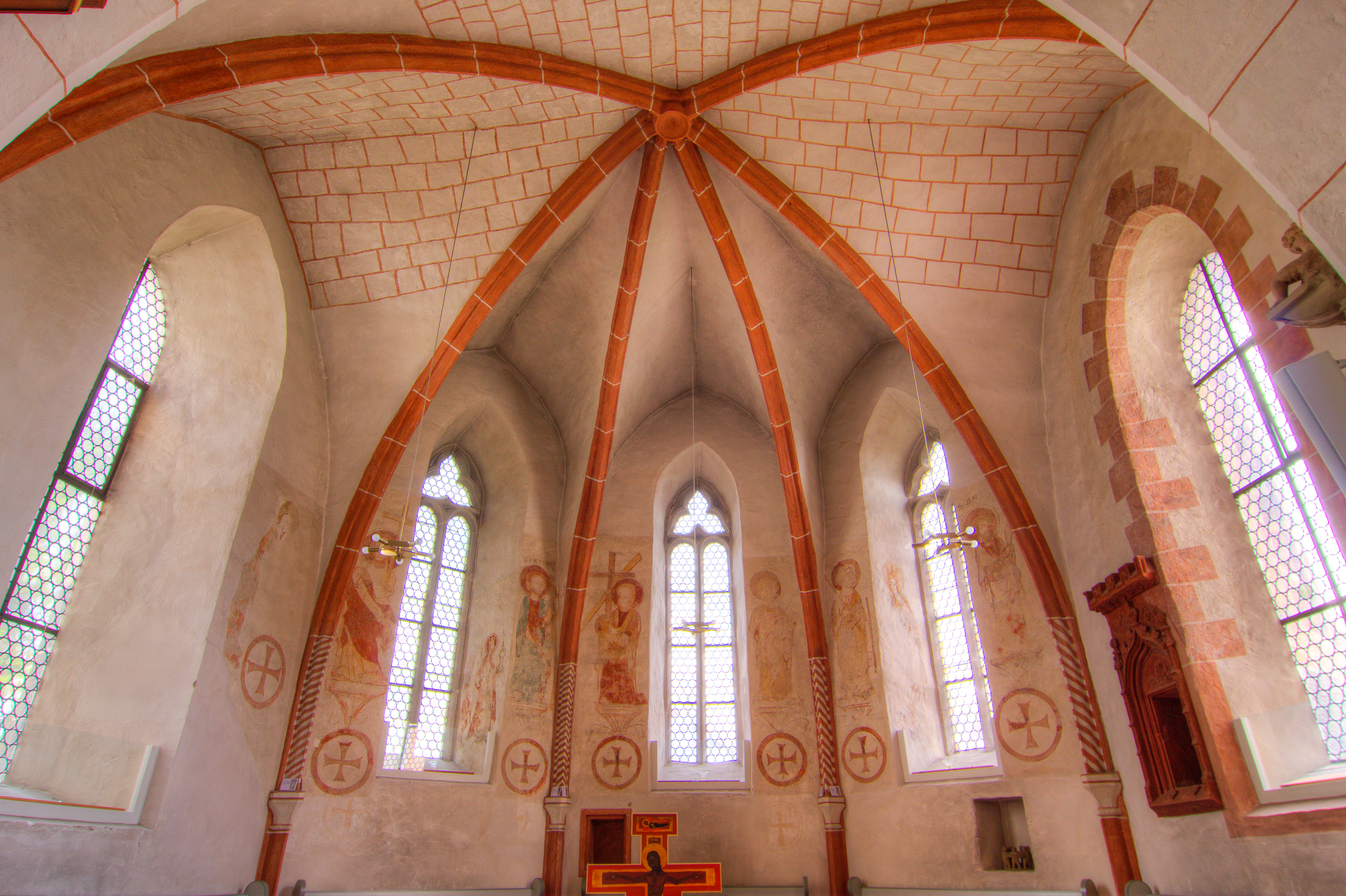 Evangelische Kirche Großen-Buseck, Landkreis Gießen in Hessen, Deutschland